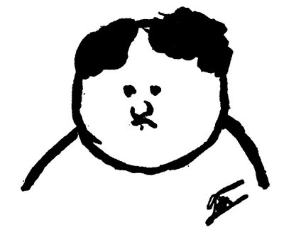 Autoritratto di Gaston de Pawlowski